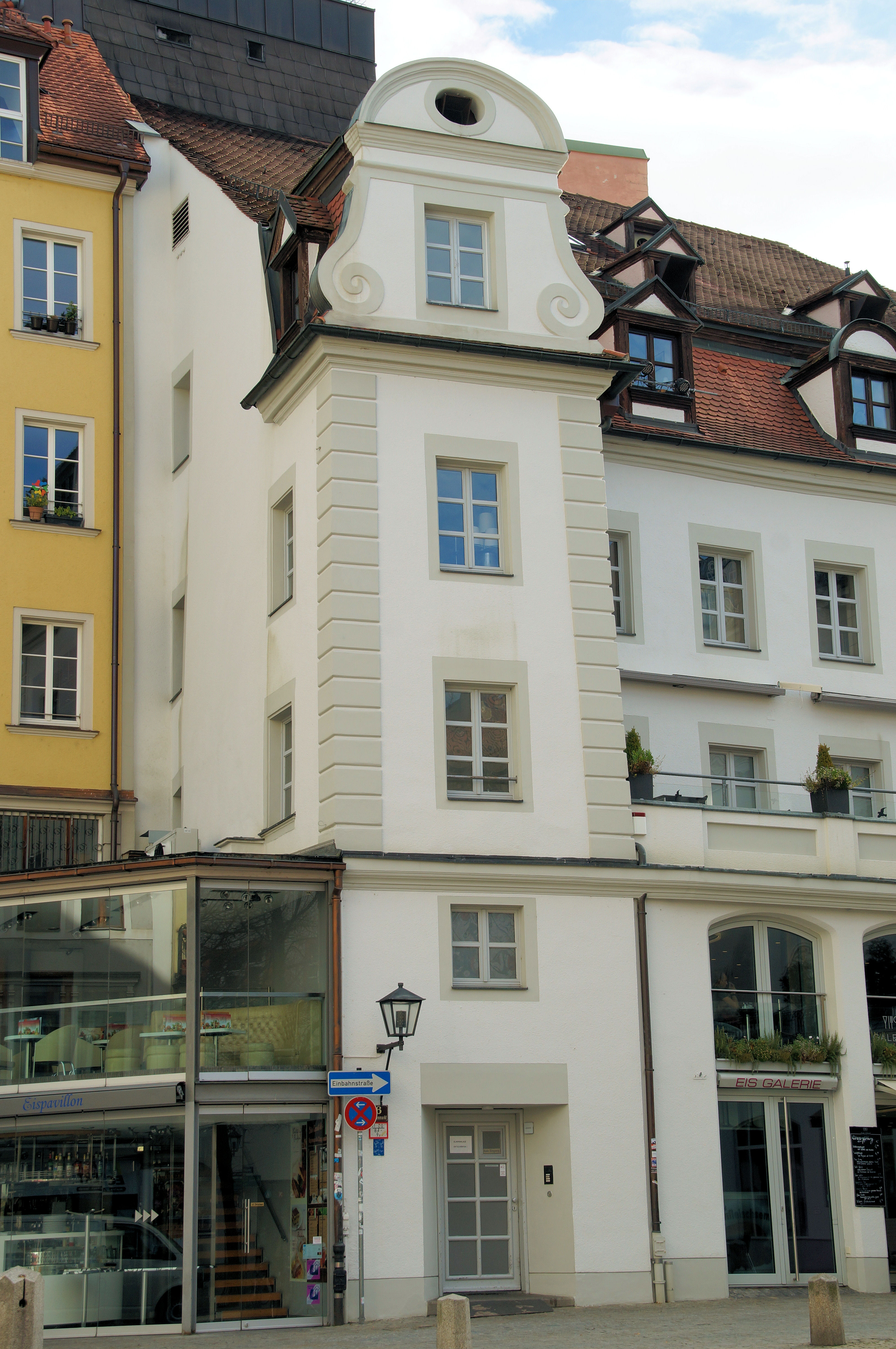 Ehem. Mohrenapotheke, viergeschossiges und traufständiges Mansarddachhaus mit einachsigem Giebelrisalit, 18. Jh.; Umbauten im 19. und 20. Jh.